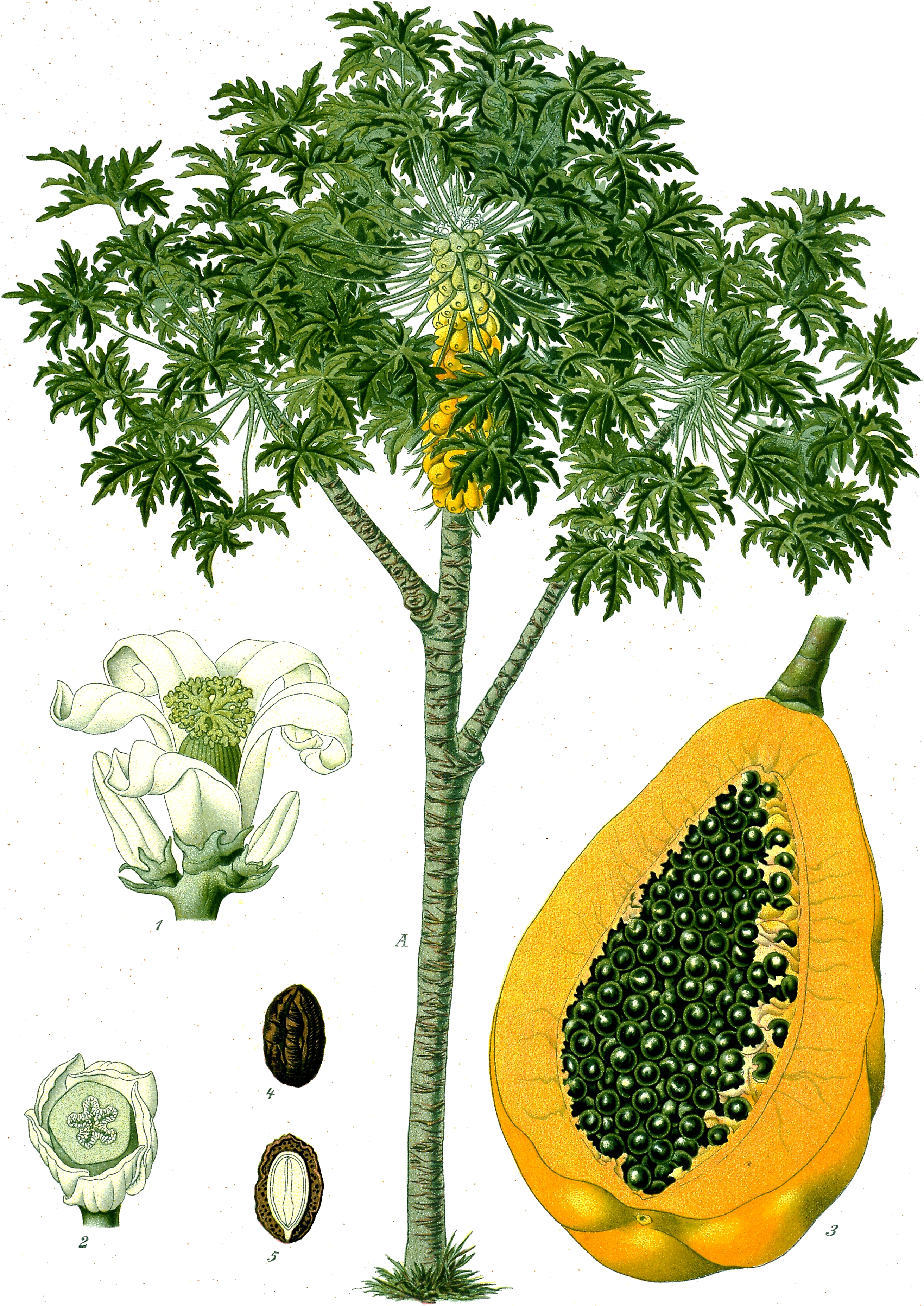 Melonenbaum. A weiblicher Baum mit zwei Seitenzweigen, verkleinert. 1 typische weibliche Blüte, natürliche Grösse; 2 dieselbe im Querschnitt, natürliche Grösse; 3 aufgeschnittene Frucht, 1/2 natürliche Grösse; 4 Samen vergrössert; 5 derselbe im Längsschnitt vergrössert.